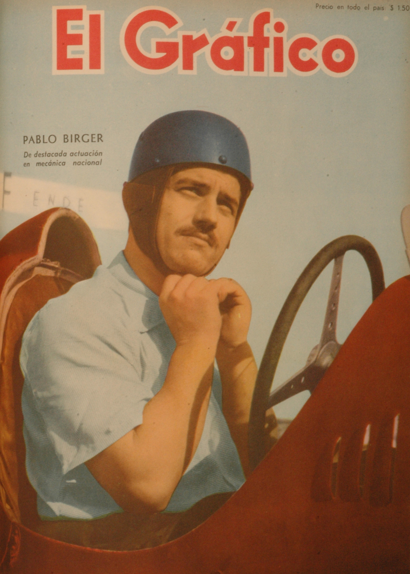 El Grafico del 18 de Abril de 1952. Edicion 1706